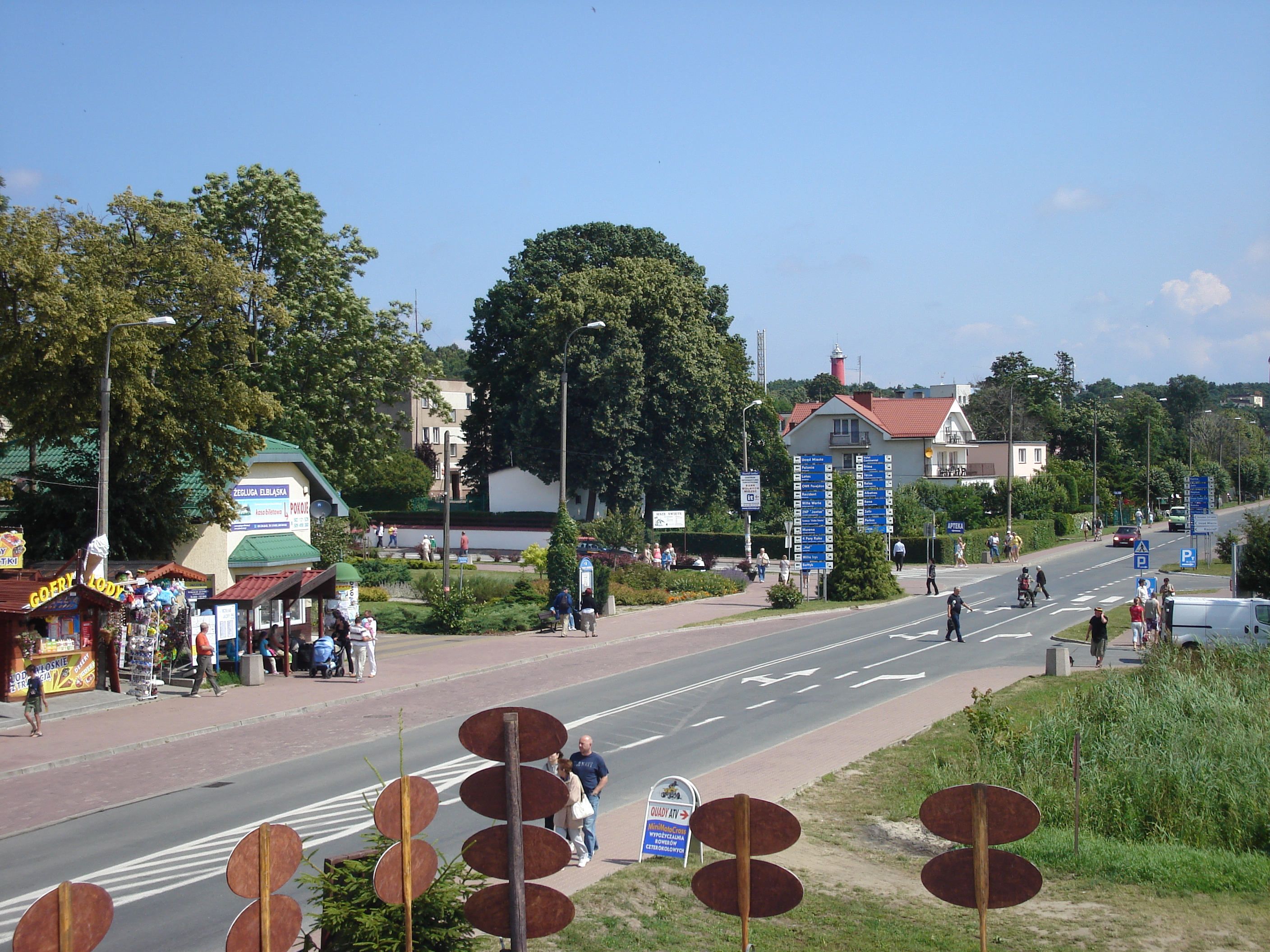 Ulica Gdańska w Krynicy Morskiej